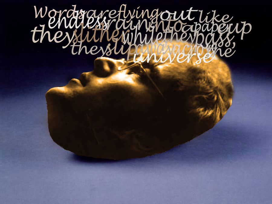 Höfundarréttur: Kristján Kristjánsson Mynd gerð af: Kristján Kristjánsson. Leyfi til birtingar: Kristján Kristjánsson.